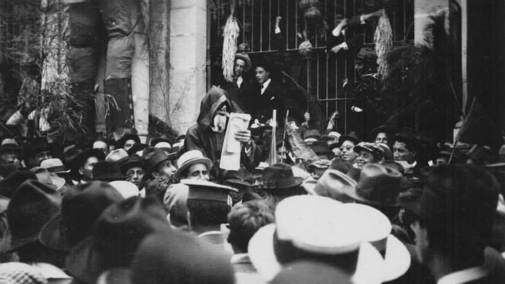 Huelga de Dolores de 1922. Lectura del boletín.